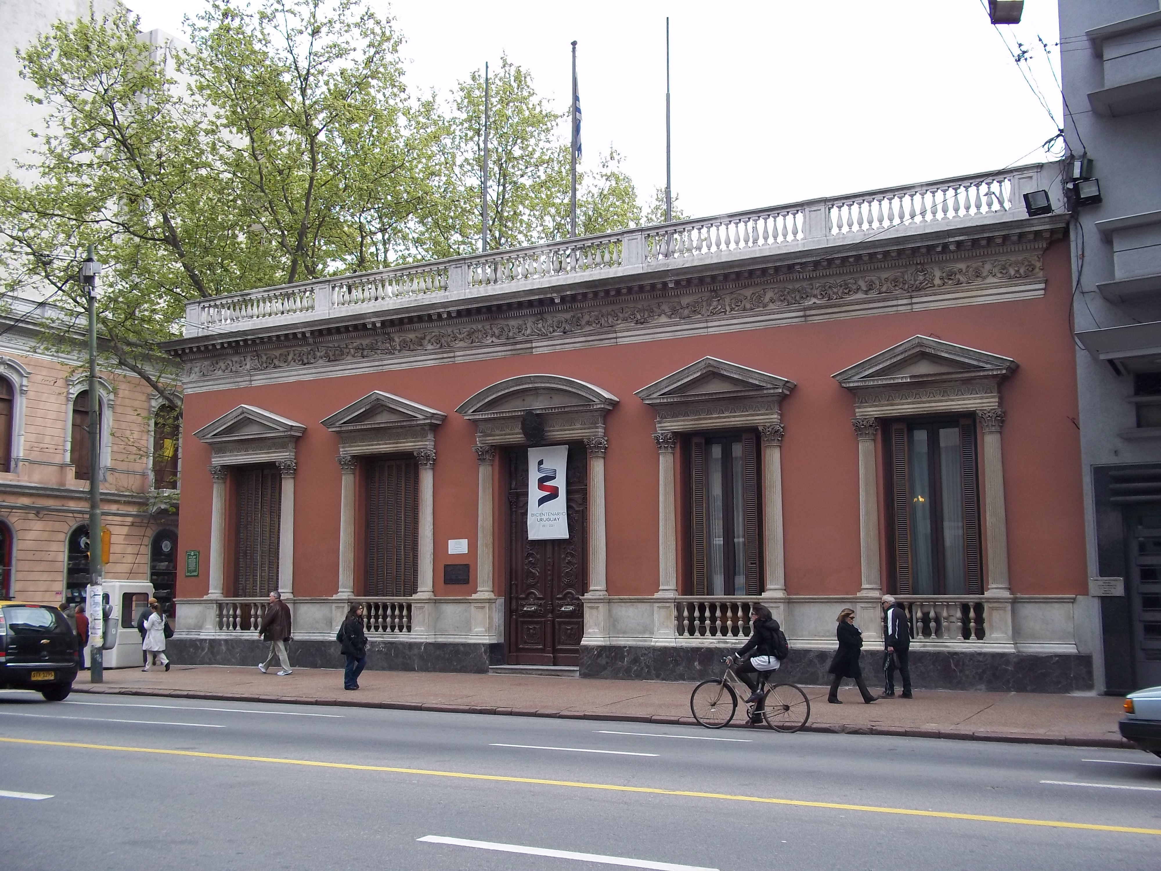 Palacio Santos, sede del Ministerio de Relaciones Exteriores de Uruguay. Se encuentra ubicado en la Avenida 18 de julio esquina Cuareim, Montevideo, Uruguay.